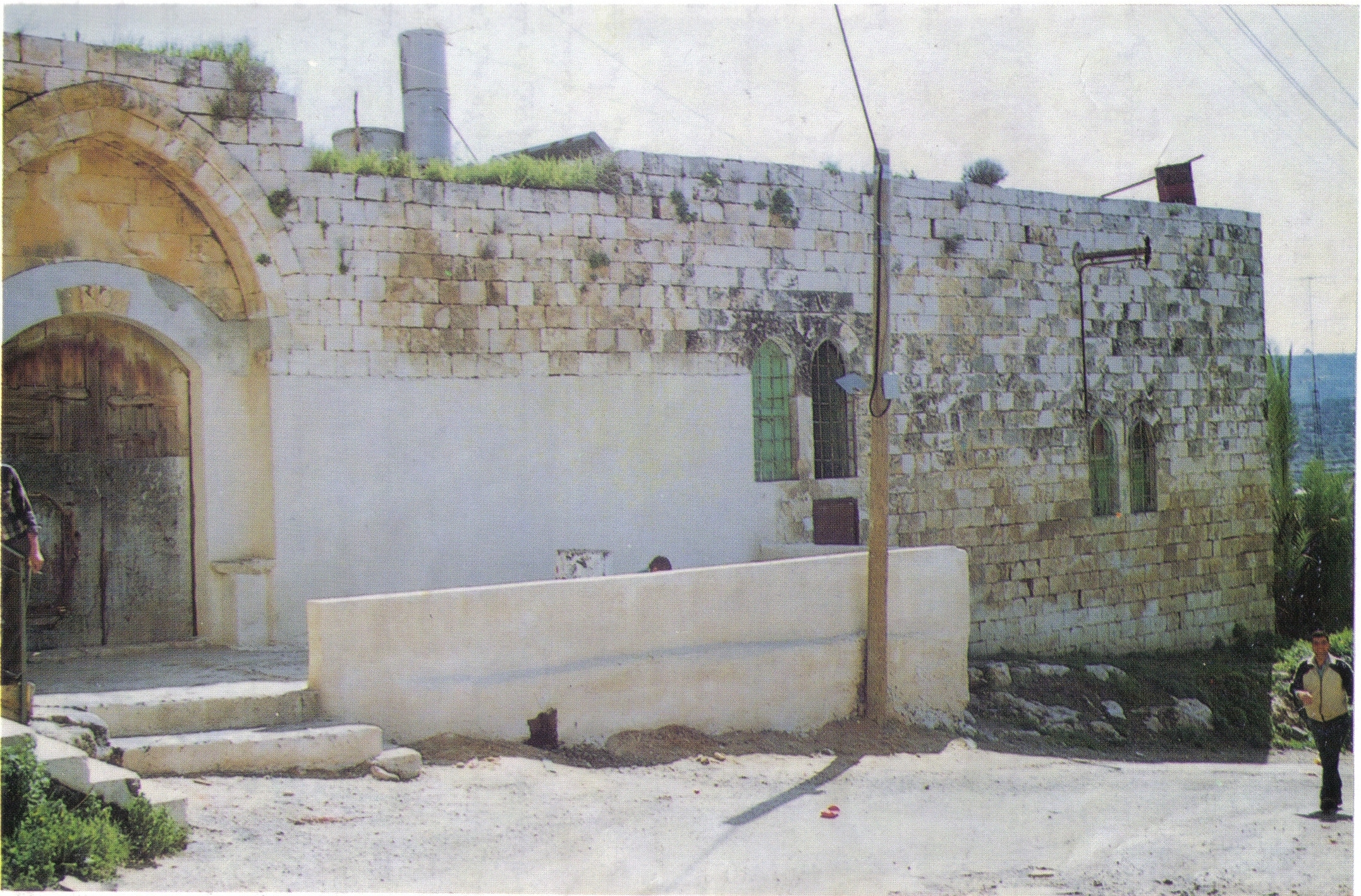 דיוואן או ישיבת חמולת מסארוה בימי עבר